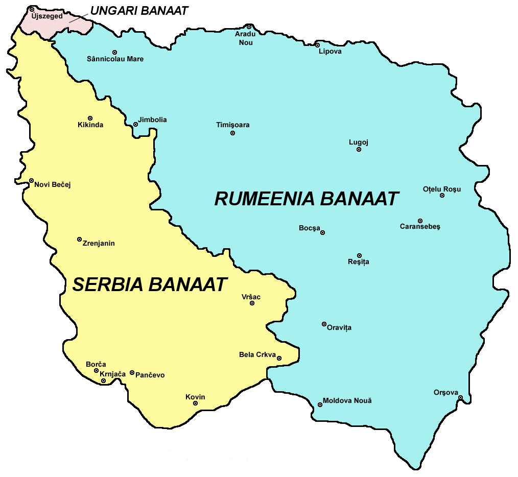 Banaat